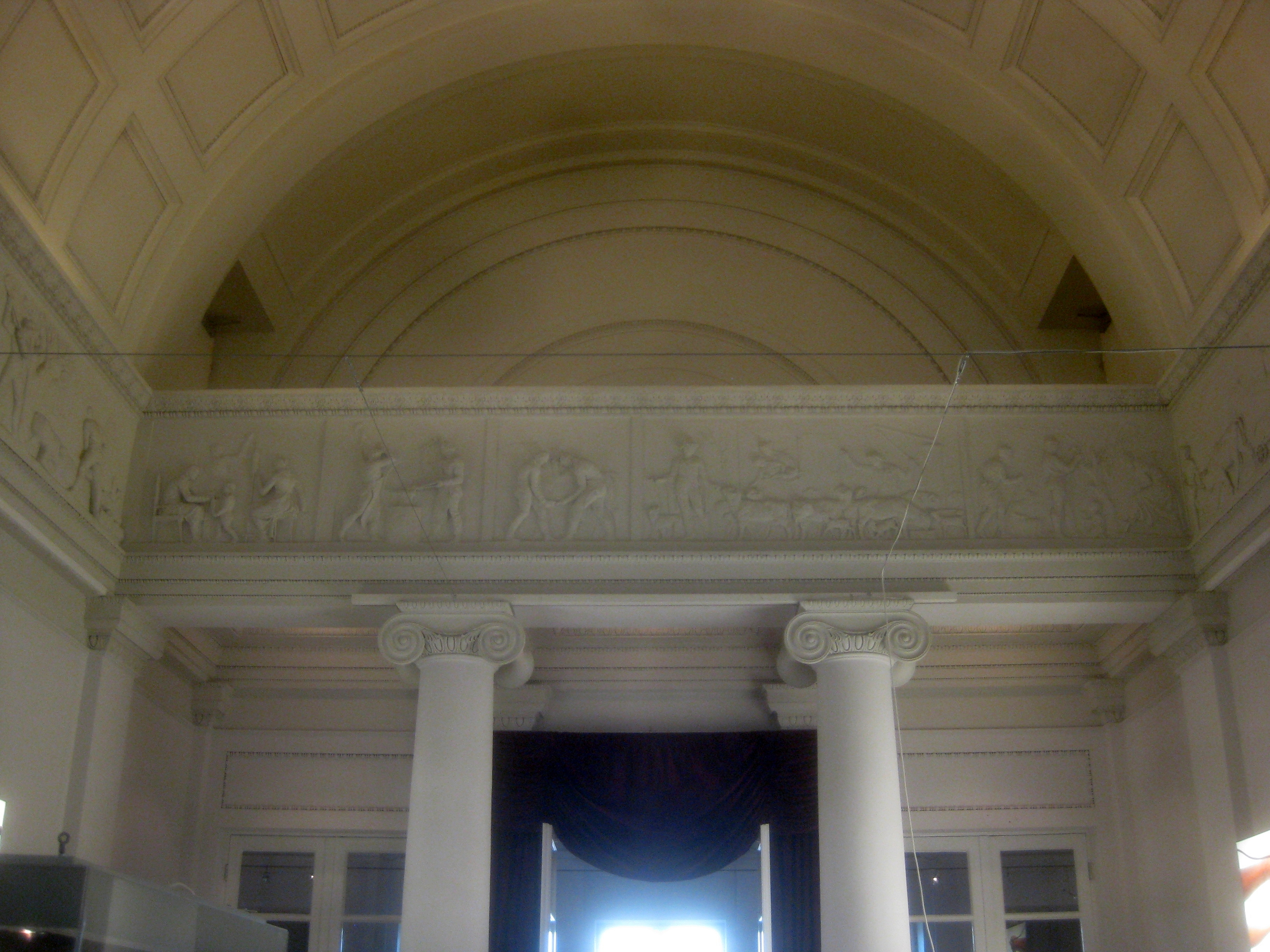 Säulenhalle (ehemals „Festsaal“) von Schloss Rosenstein in Stuttgart. Blick zum ehemaligen Speisesaal und auf das Tonnengewölbe. Zwischen Säulen und Gewölbe: Teil des Vierjahreszeitenfrieses von Conrad Weitbrecht.